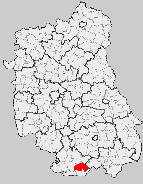 Map of gmina Łukowa, Biłgoraj county, Lublin voivodship Mapa gminy Łukowa, powiat biłgorajski, województwo lubelskie